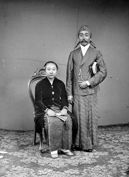 Negatief. Portret van de Regent van Besoeki met zijn echtgenote